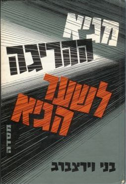 "מגיא ההריגה לשער הגיא"